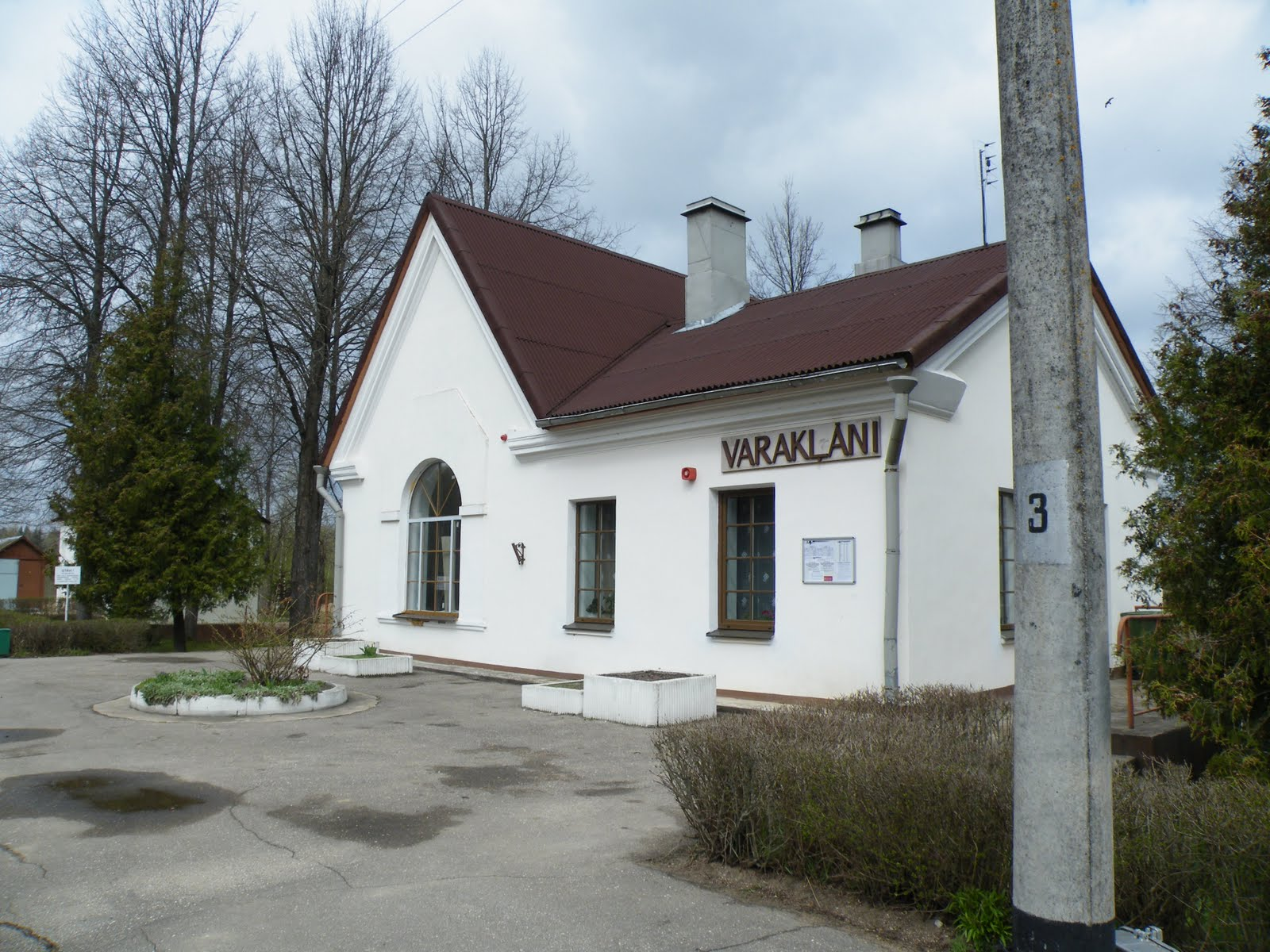 Stacija Varakļāni